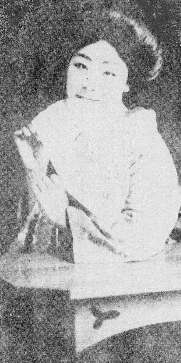 渡瀬淳子 1919